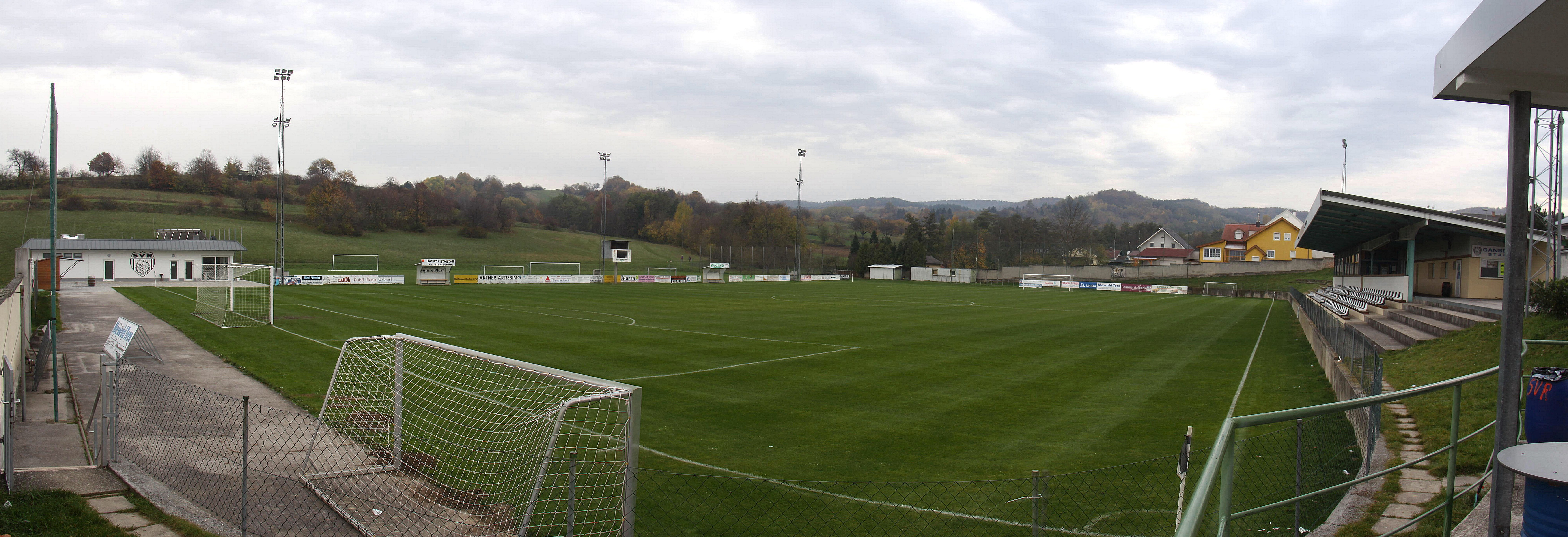 Gansbärenstadion des SV Rohrbach (Panoramafoto, zusammengesetzt aus 3 Einzelbildern).